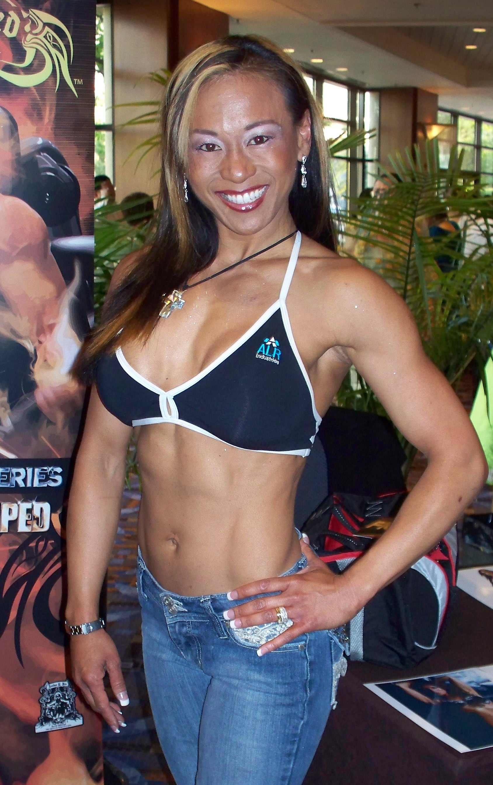 Krissy Chin